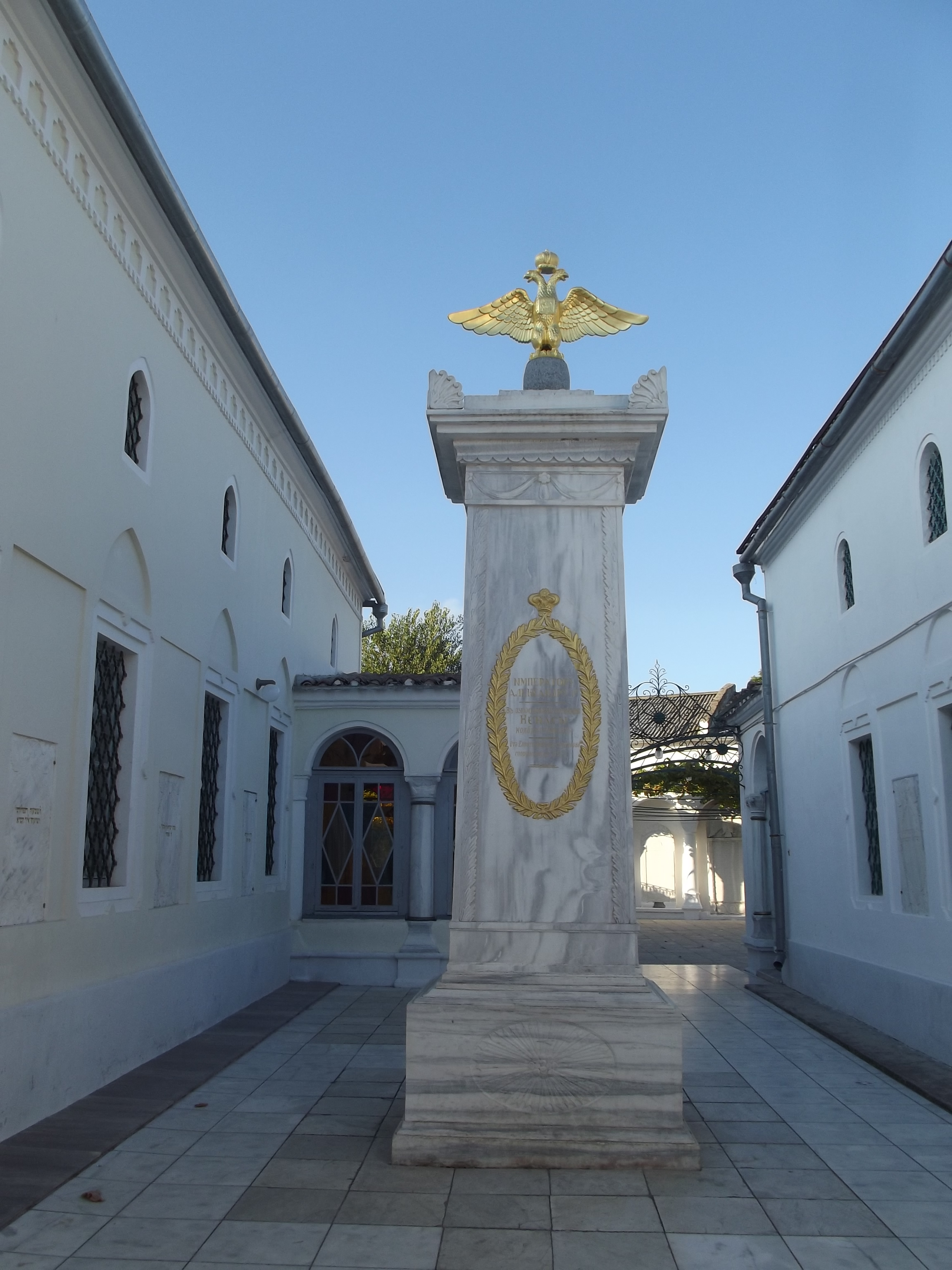 Обелиск в честь Александра I